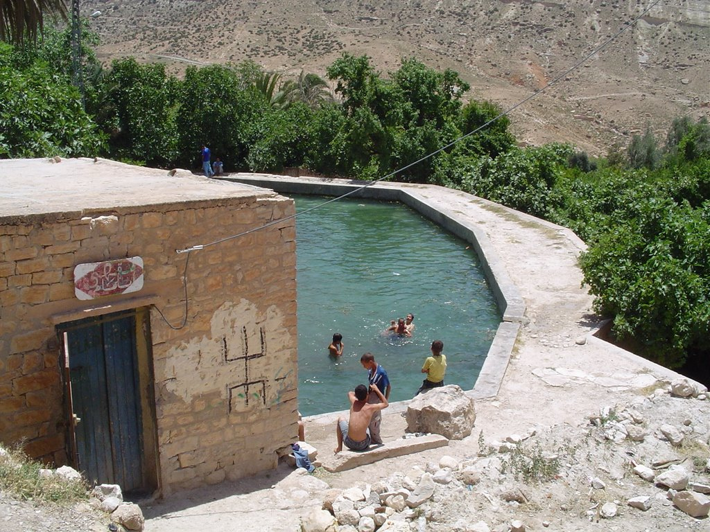 bassin a eau de Tkout